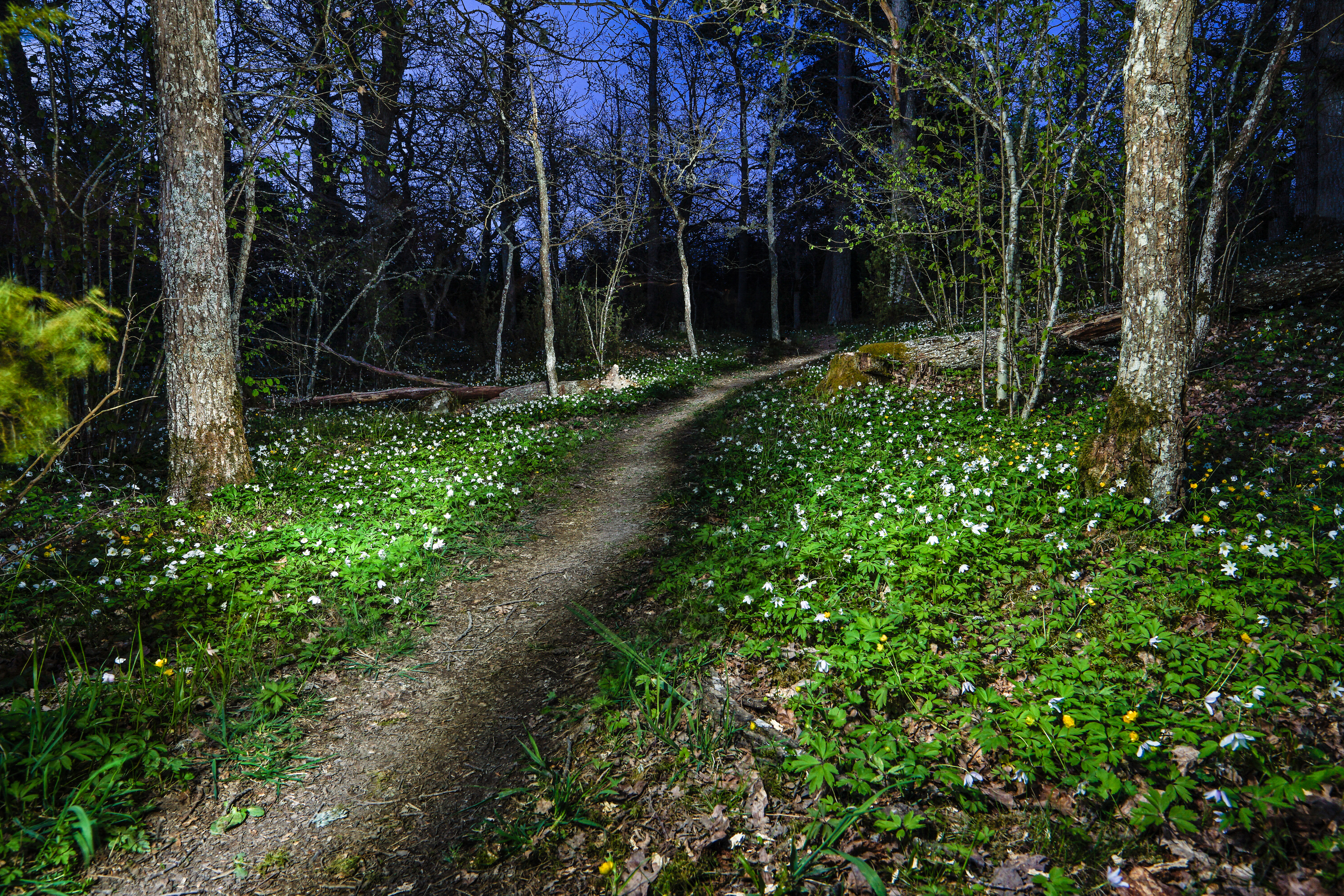 Bild tagen i Haga Ekbackars naturreservat utanför Enköping.